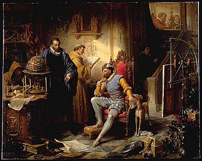 L'imperatore Rodolfo II e l'astronomo Tycho Brahe, due personaggi celebri del 1600 Praghese.